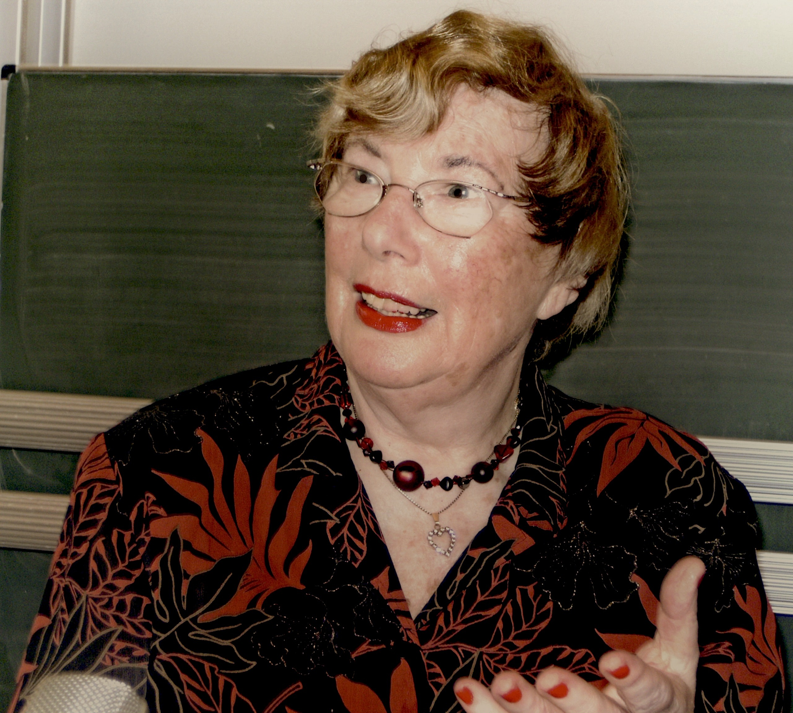 Felicia Langer, israela advocato kaj aktivulo pri homaj rajtoj. Fotita antaux sxia prelego "La senrajtigo de la palestinanoj - cxu eblas paco en Mezoriento?" en Freiburg (DE)